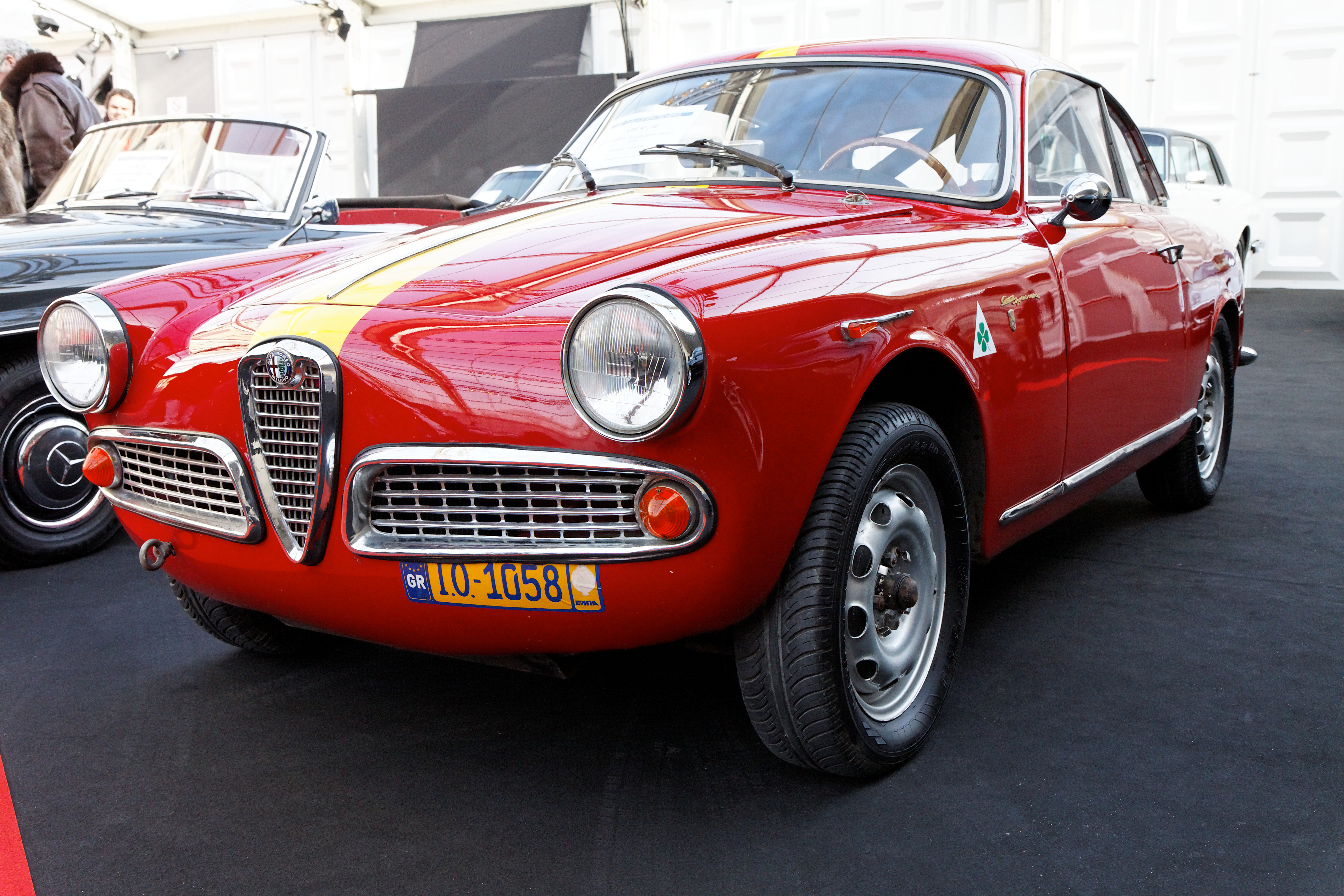 Alfa Romeo Giulietta Sprint Veloce - Festival Automobile International 2011 - Vente aux enchères